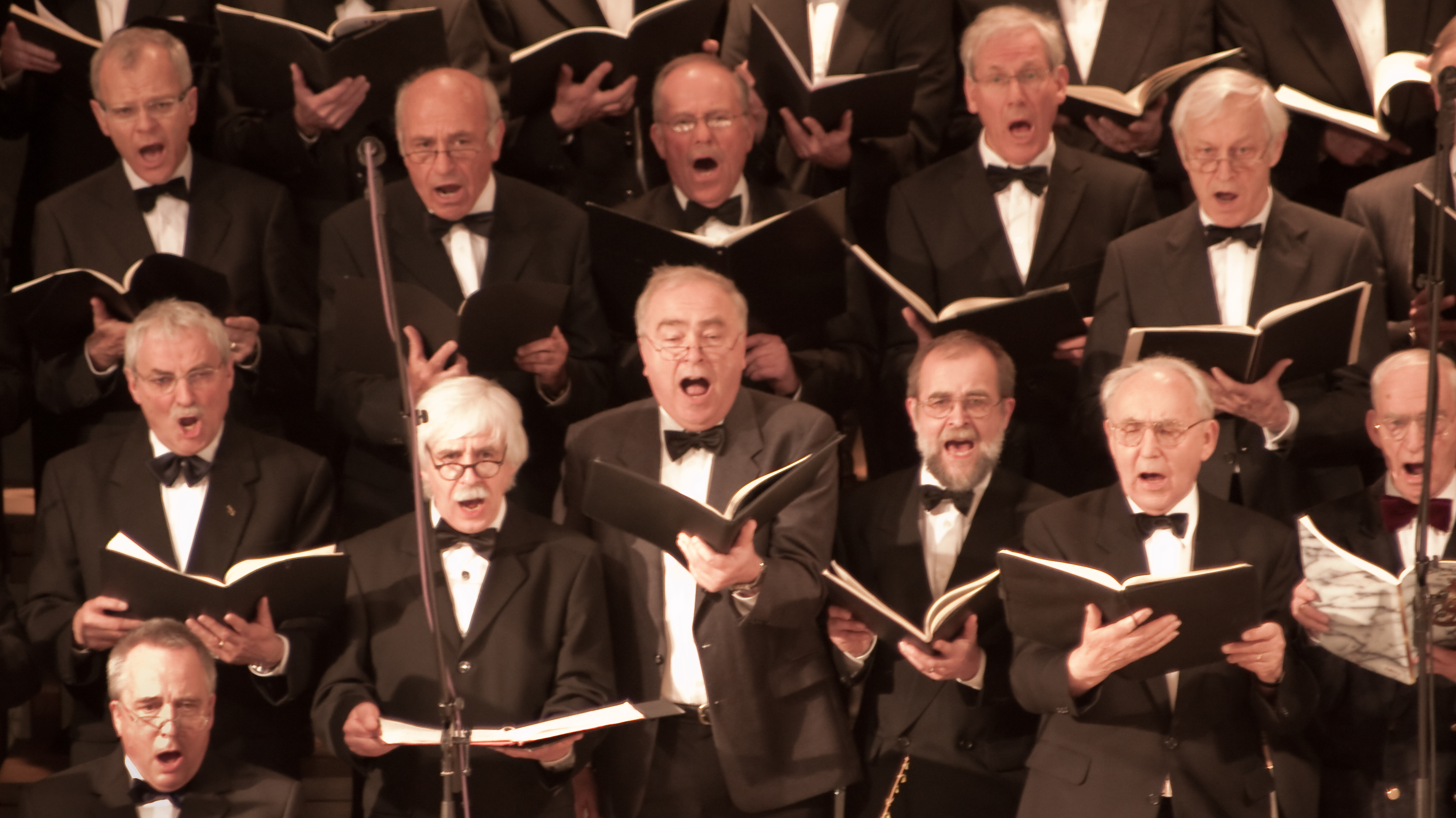 Pauluskirche in Ulm, Germany